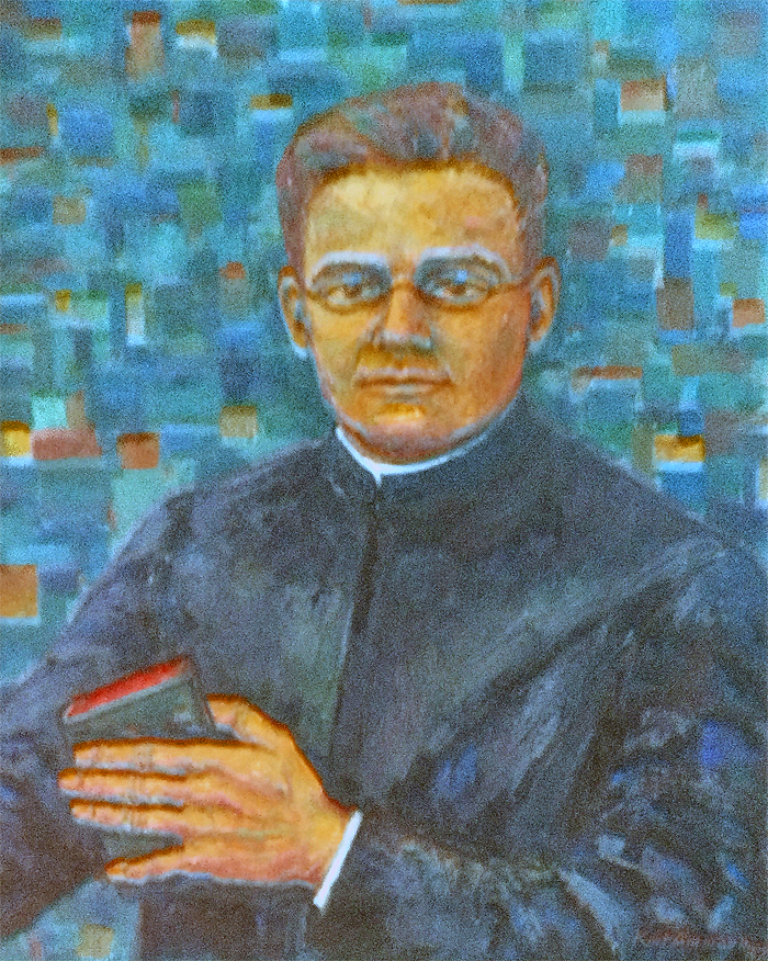 Franziskus Maria vom Kreuze Jordan, Gemälde von Kurt Ammann (1959) in St. Michael, 1. Wiener Gemeindebezirk